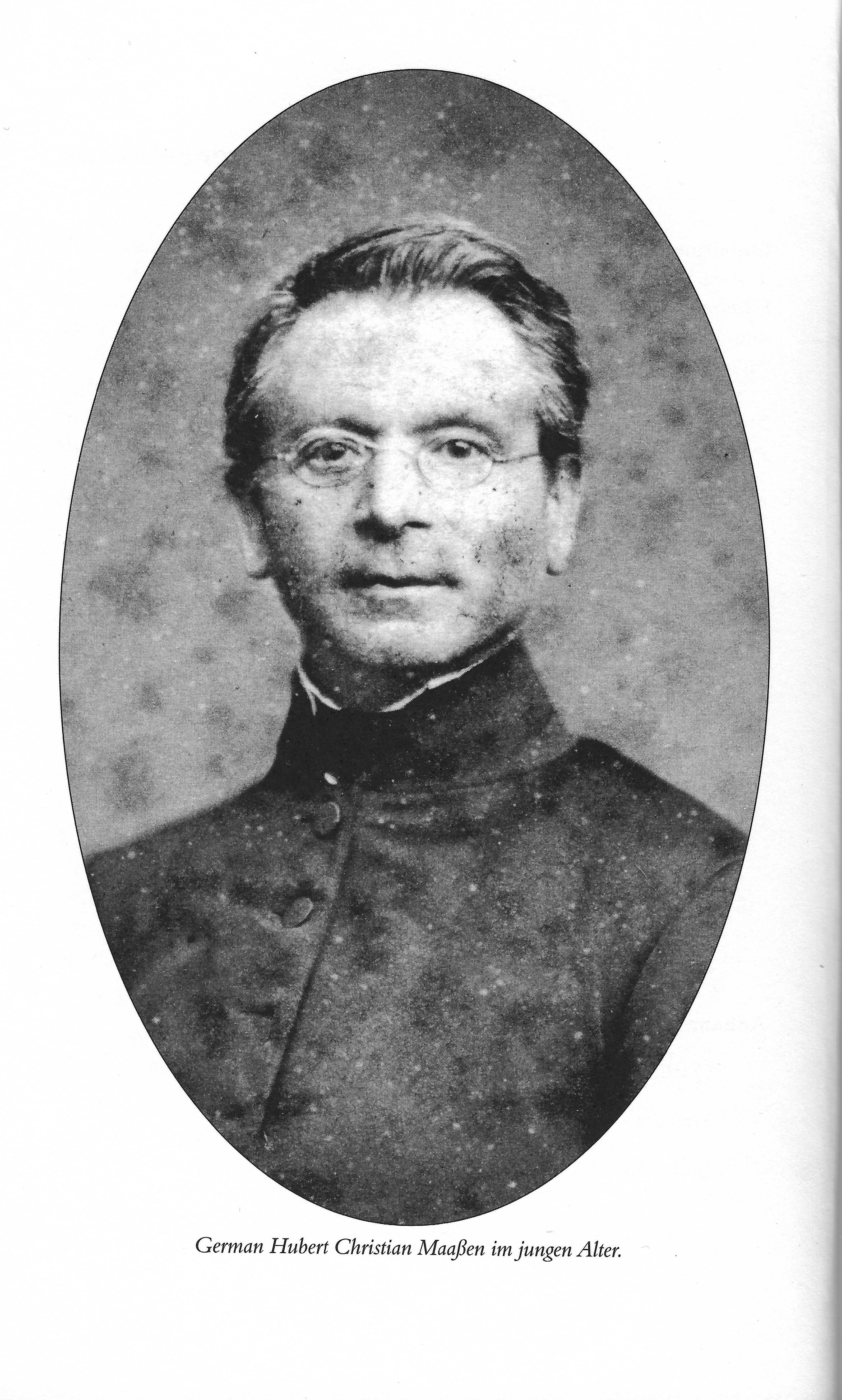 Germman Hubert Christian Maaßen